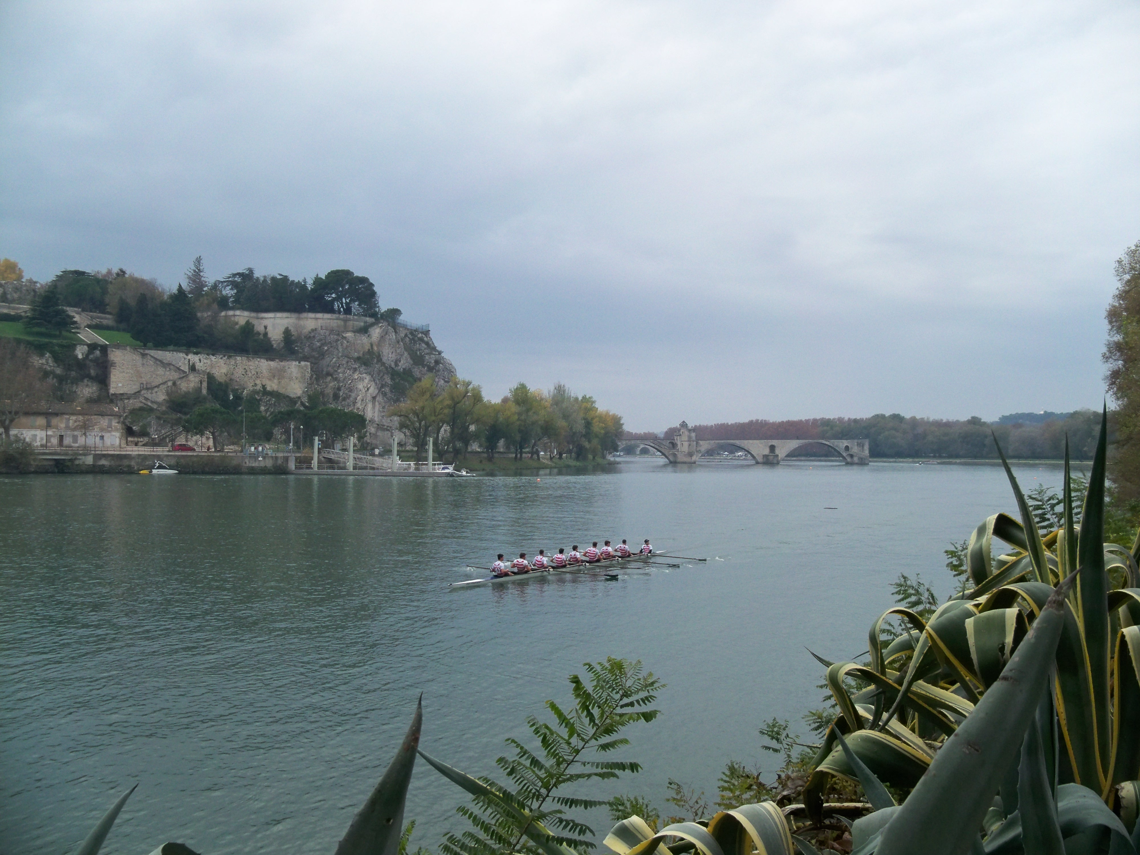 Rowing Avignon Cup Edition 2011